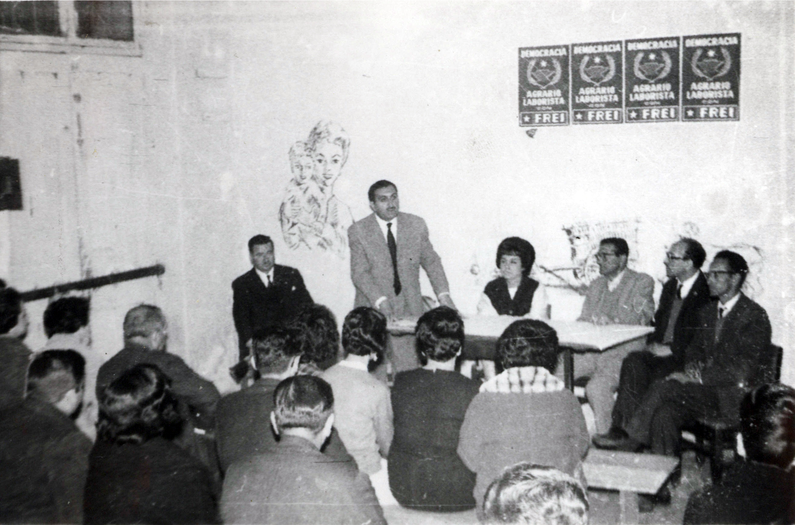 Alejandro Hales Jamarne en una reunión con dirigentes del Partido Democracia Agrario Laborista en la ciudad de Los Ángeles con motivo de la campaña presidencial a favor del candidato a la presidencia de la República, el democratacristiano Eduardo Frei Montalva. 1964